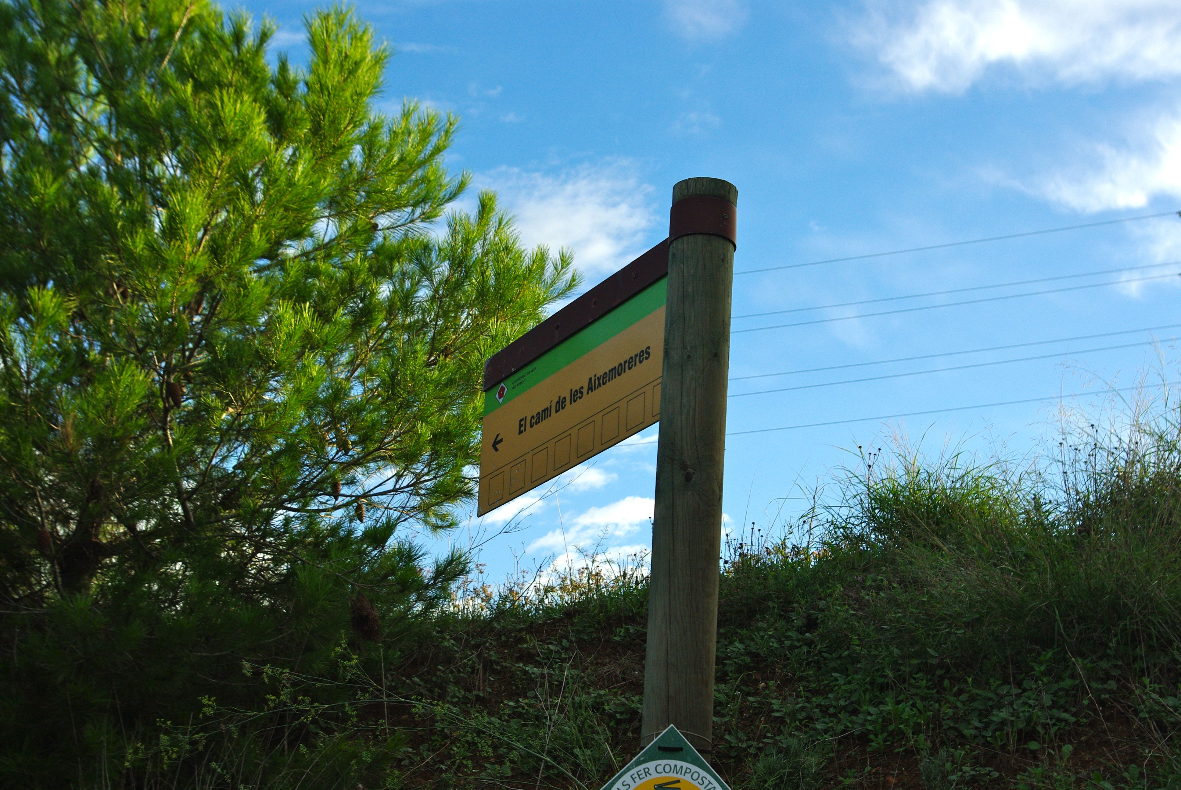 Camí d'Aixemoreres, al terme de Reus